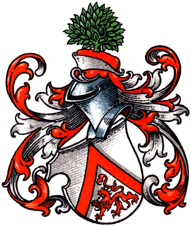 Wappen des Rittergeschlechts von Elsen bei Paderborn